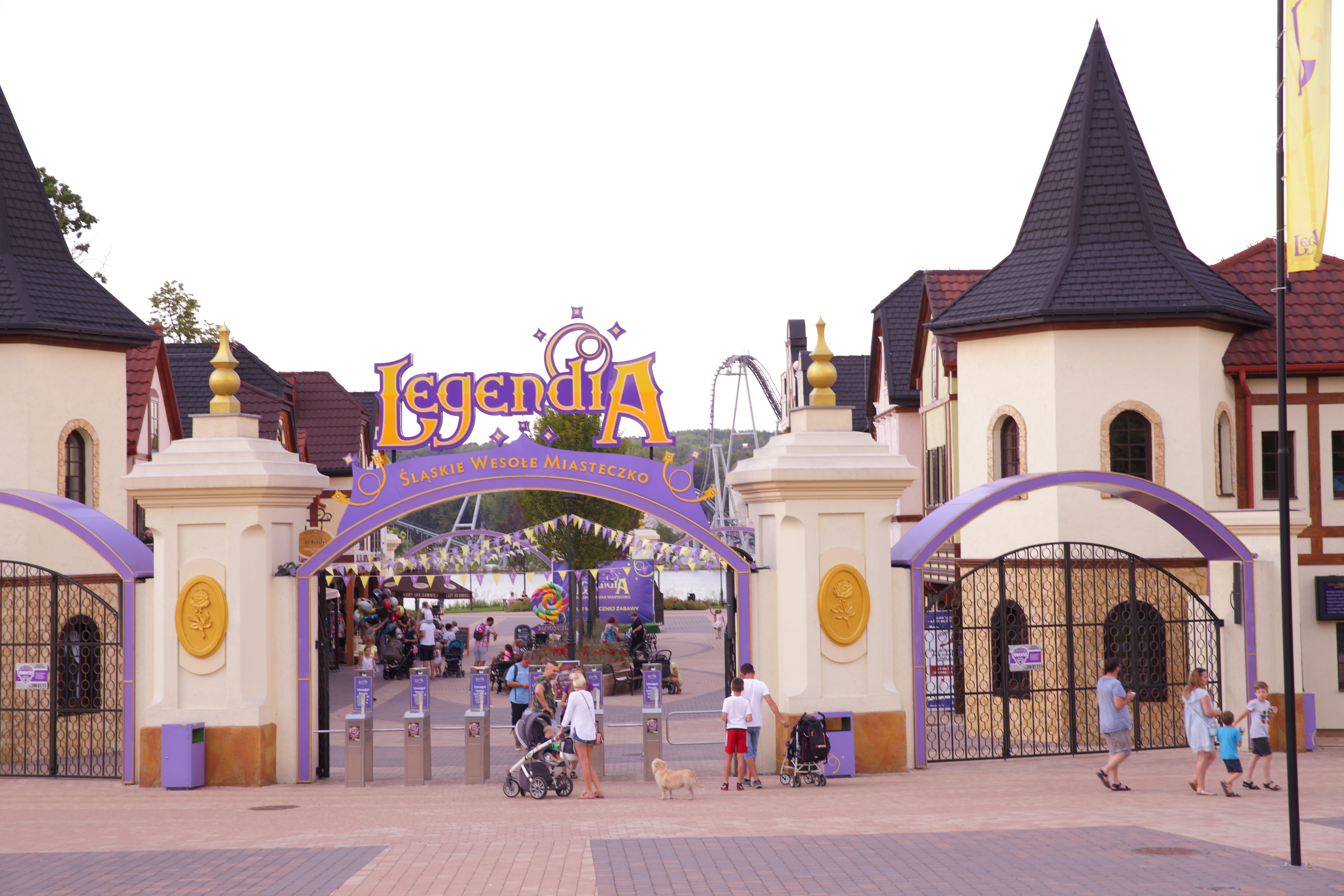 Brama wejściowa do parku Legendia (Śląskie Wesołe Miasteczko).